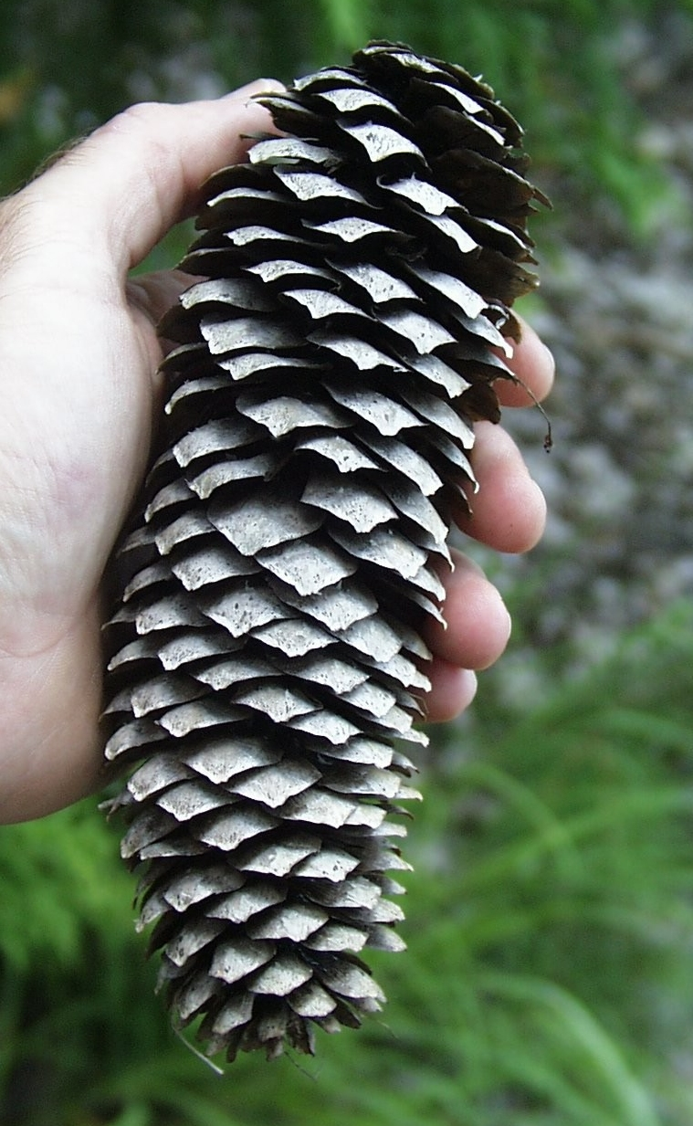 Picea abies cone